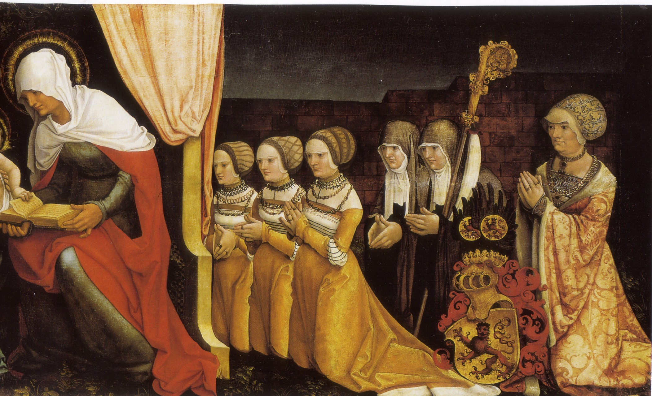 detail Votivtafel